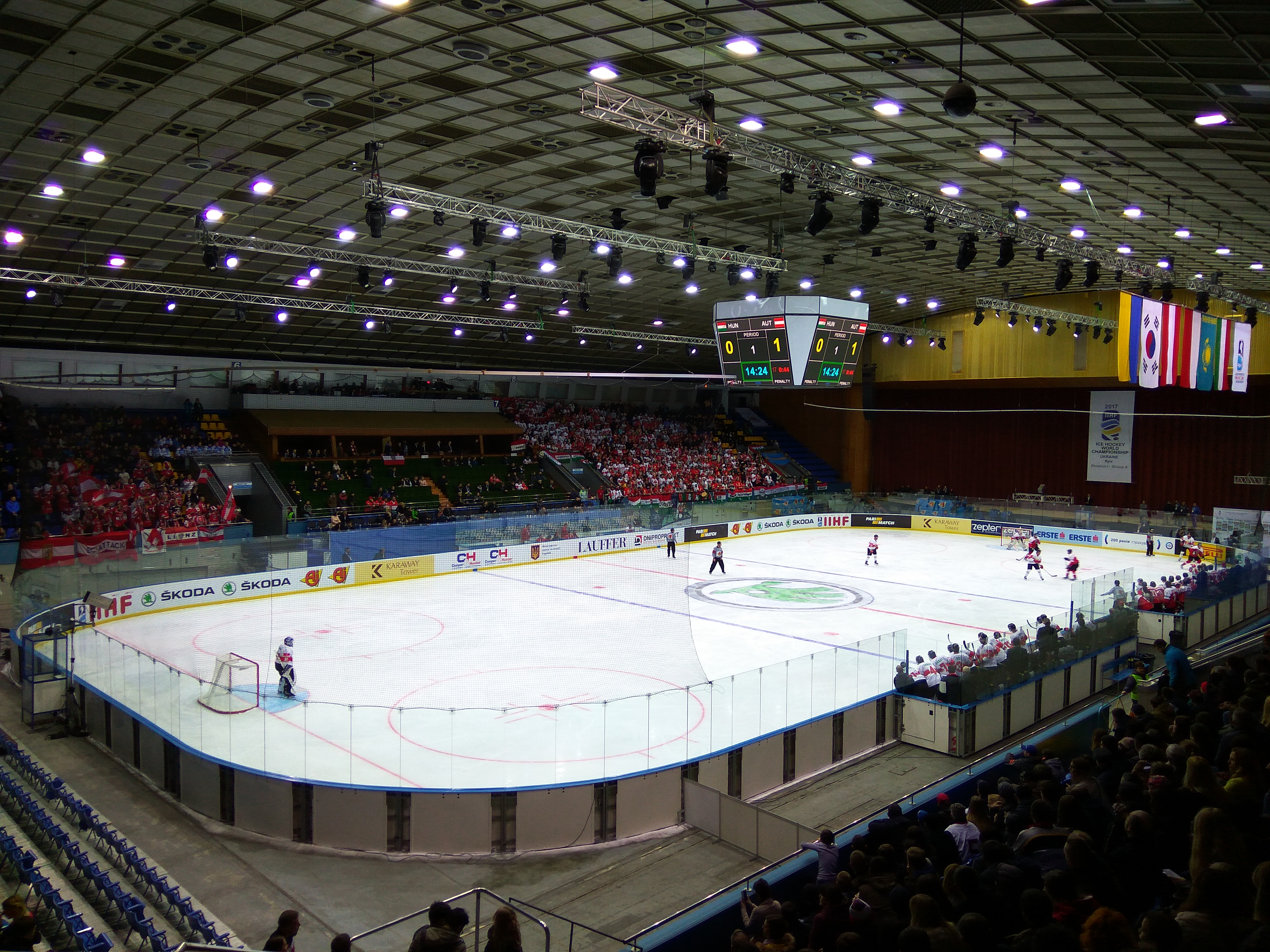 Чемпіонат світу з хокею 2017 у першому дивізіоні. Угорщина-Австрія.